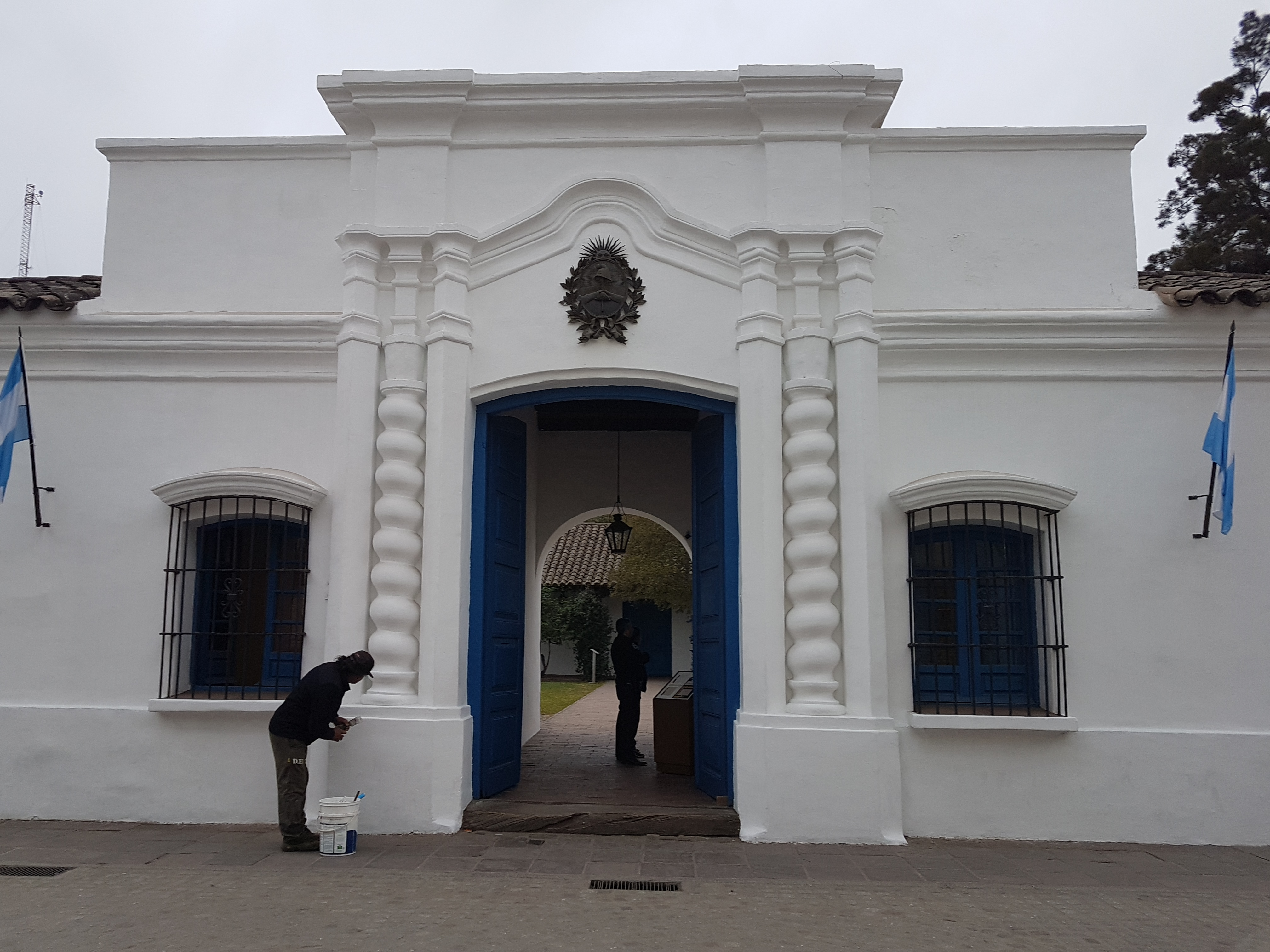 El Museo Casa Histórica de la Independencia está emplazado en la antigua casona en la que se declaró la Independencia de las Provincias Unidas de Sud América, el 9 de julio de 1816.casa histórica